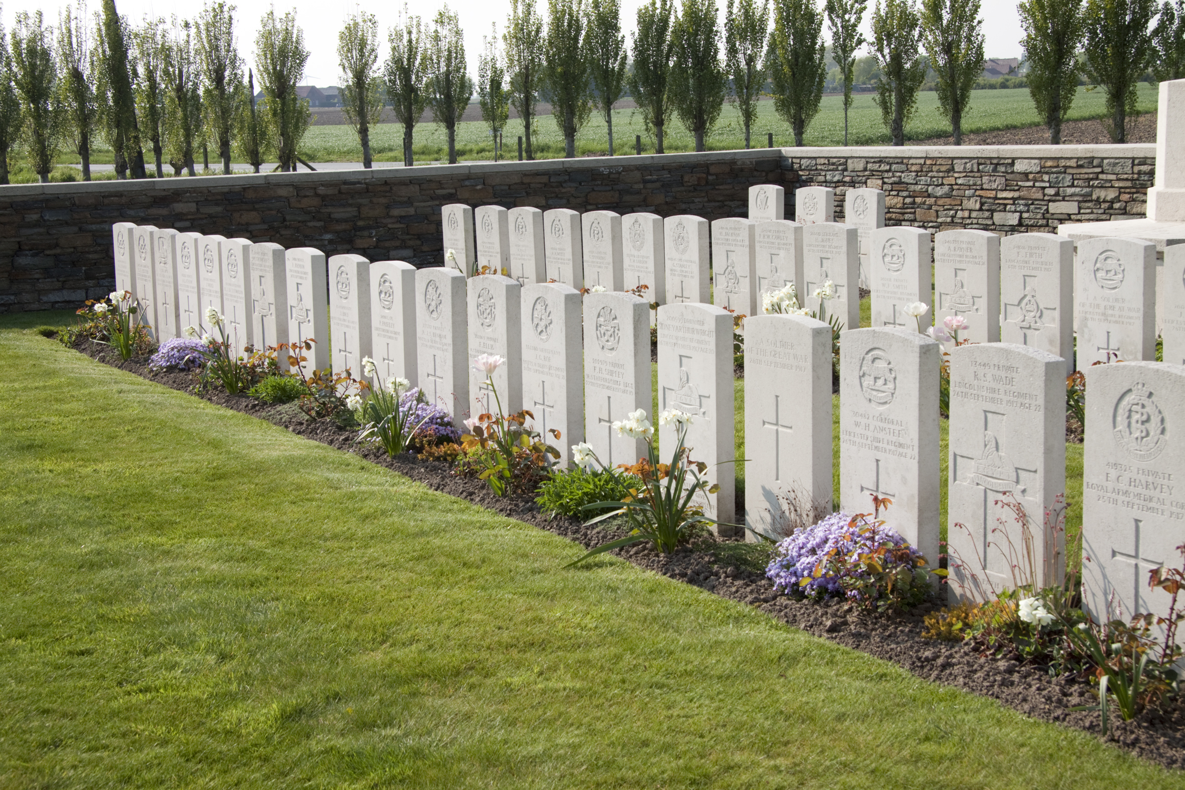 Bridge House Cemetery. Graven.